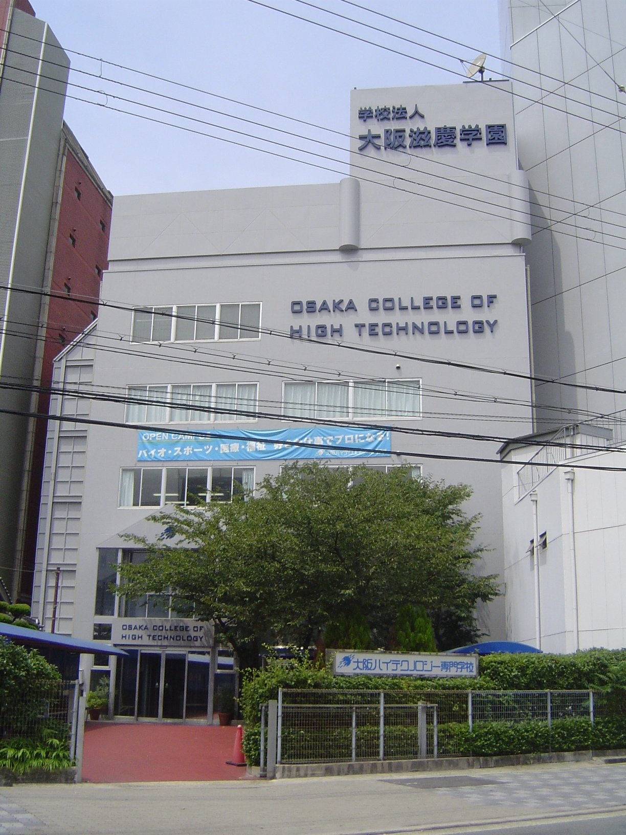 大阪ハイテクノロジー専門学校 本館校舎